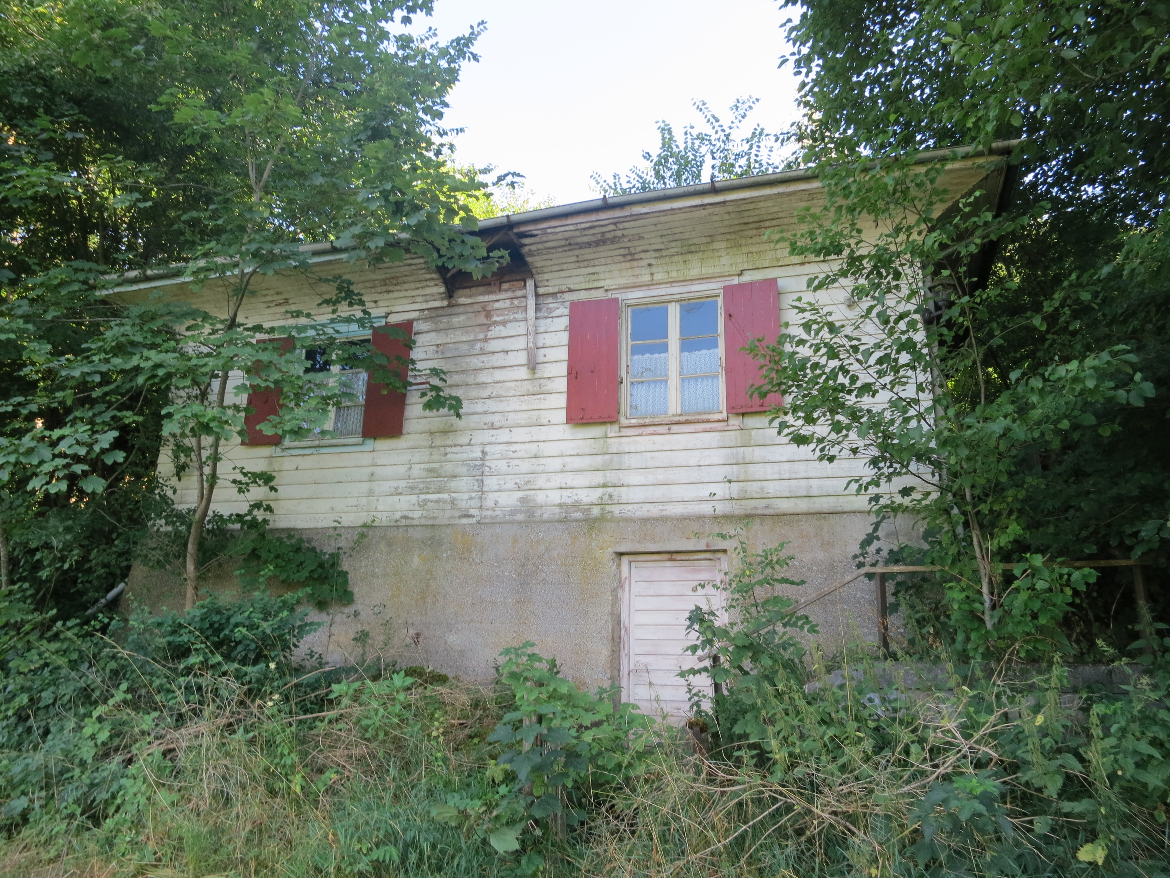 Ehemaliges Empfangsgebäude des stillgelegten Haltepunkts Theresienbad